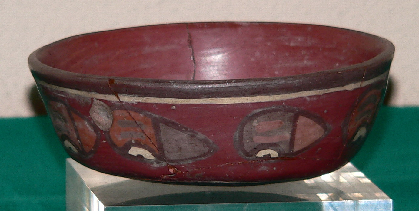 Descripción: Plato Antigüedad: Entre el siglo I y siglo VI d.C Cultura: Cultura Nazca País : Perú Fotógrafo: © Manuel González Olaechea y Franco Fecha de la foto : 25 de abril de 2008